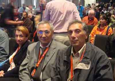 Opening ceremony of 33 International Geological Congress, 6-14 August, 2008, Oslo, Norway